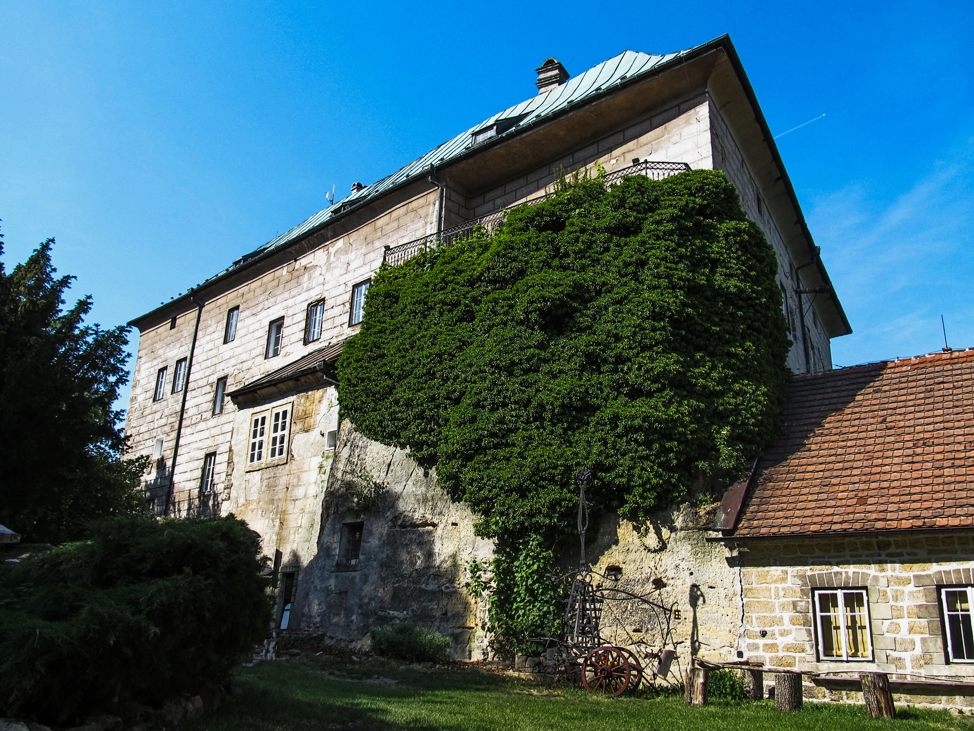 Hrad Houska (CHKO Kokořínsko)